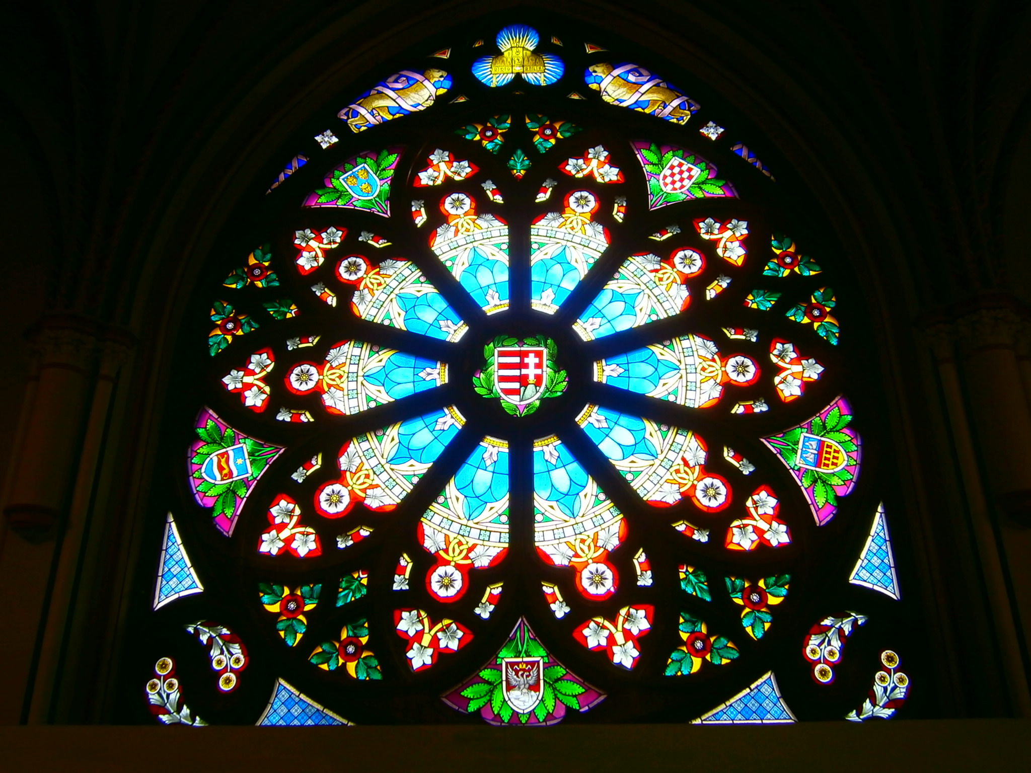 Festett üvegablak a Magyar Mezőgazdasági Múzeumban, Budapesten